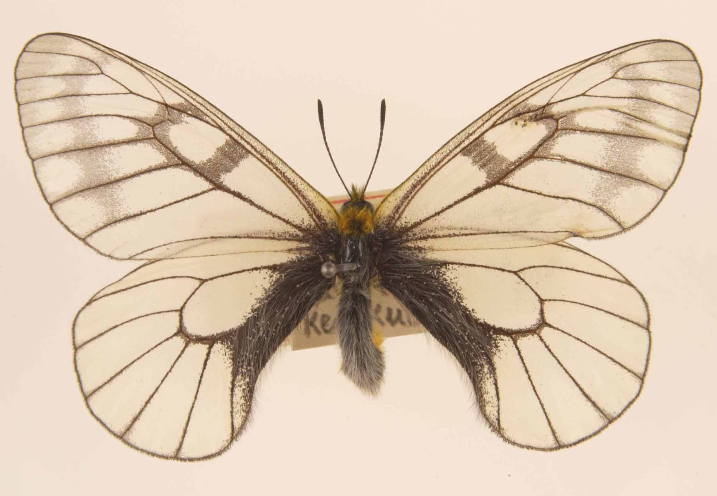 Parnassius glacialis shikokuensis Nakahara, 1935: 76 Male PARATYPE. Isizuchi, Shikoku, May 1935, Ken Kubo/Shikokuensis, Nakahara, Paratype/Type P.T./Mr 9911